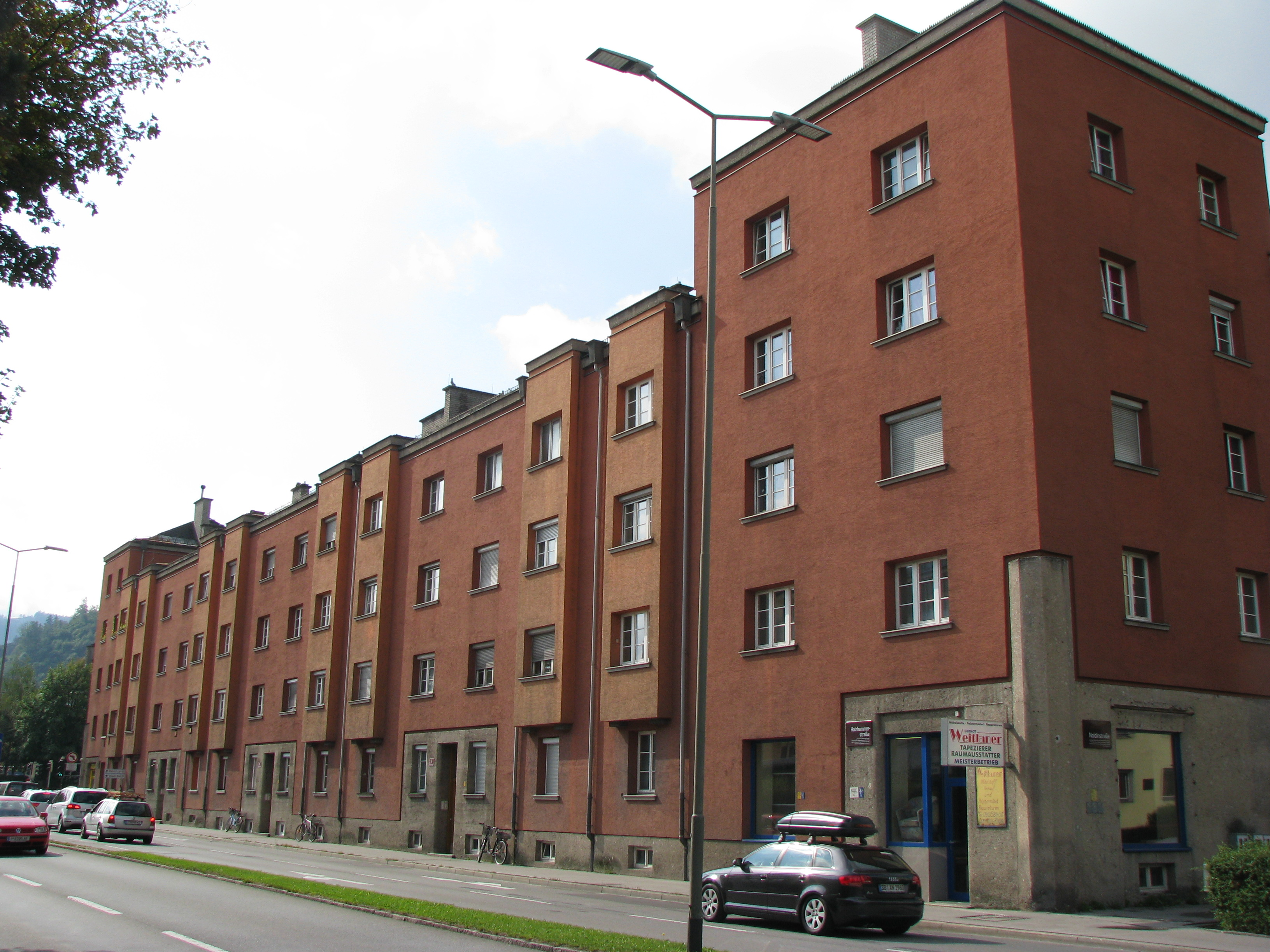 Innsbruck-Wilten: Mandelsbergerblock, erbaut 1922-1925 nach Plänen von Theodor Prachensky & Jakob Albert This media shows the remarkable cultural object in the Austrian state of Tyrol listed by the Tyrolean Art Cadastre with the ID 67752. (on tirisMaps, pdf, more images on Commons, Wikidata)